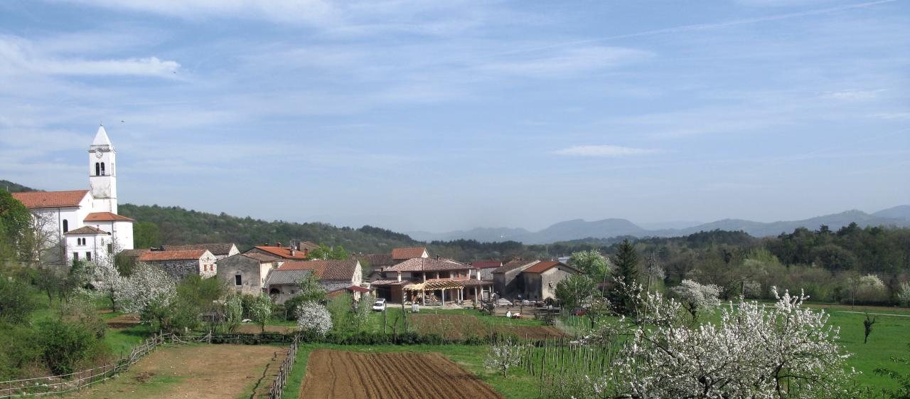 Črniče